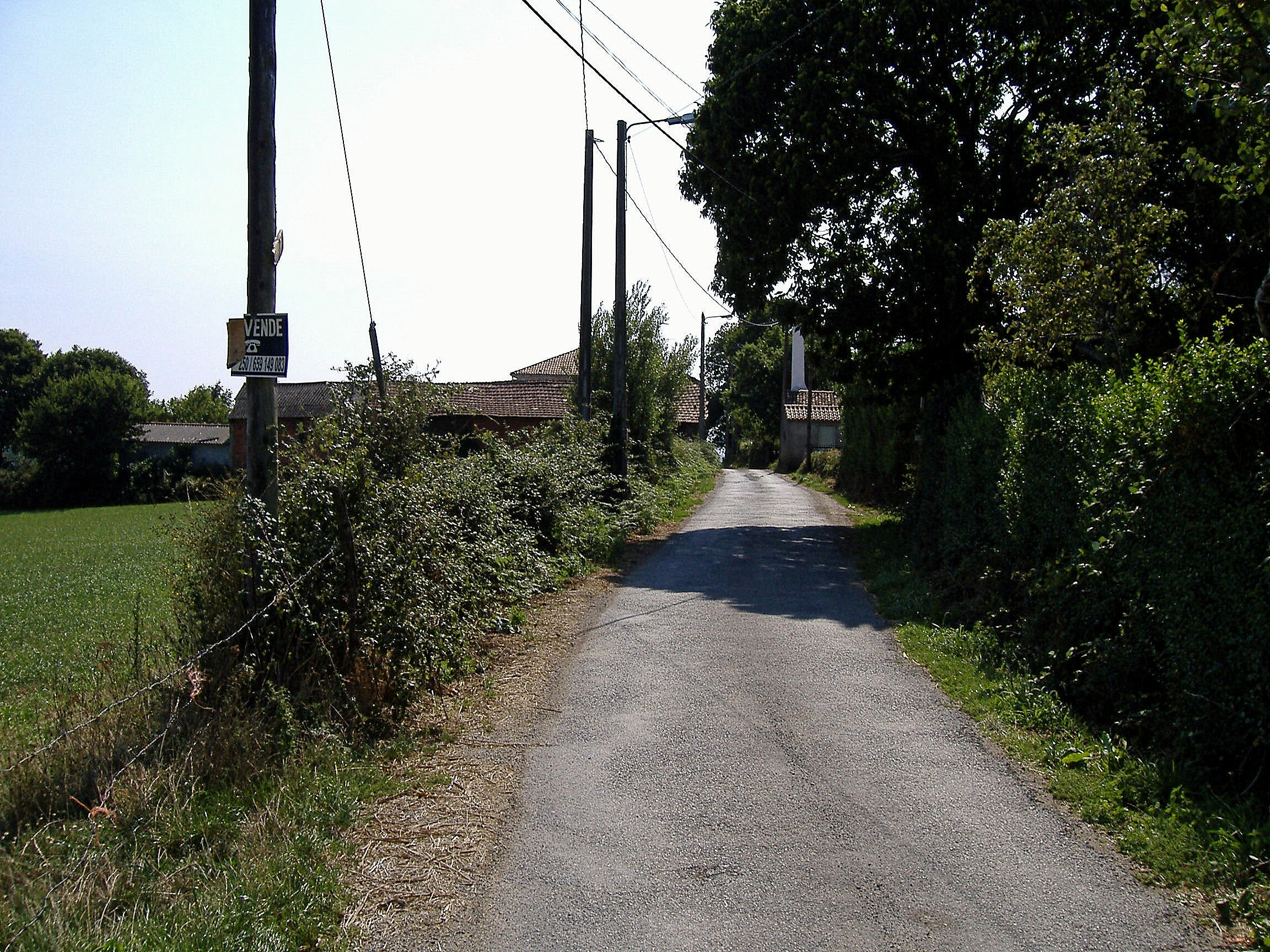 Lugar de Sanxiao na parroquia de Zas de Rei, concello de Melide.